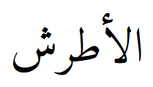 Аль-Атраш